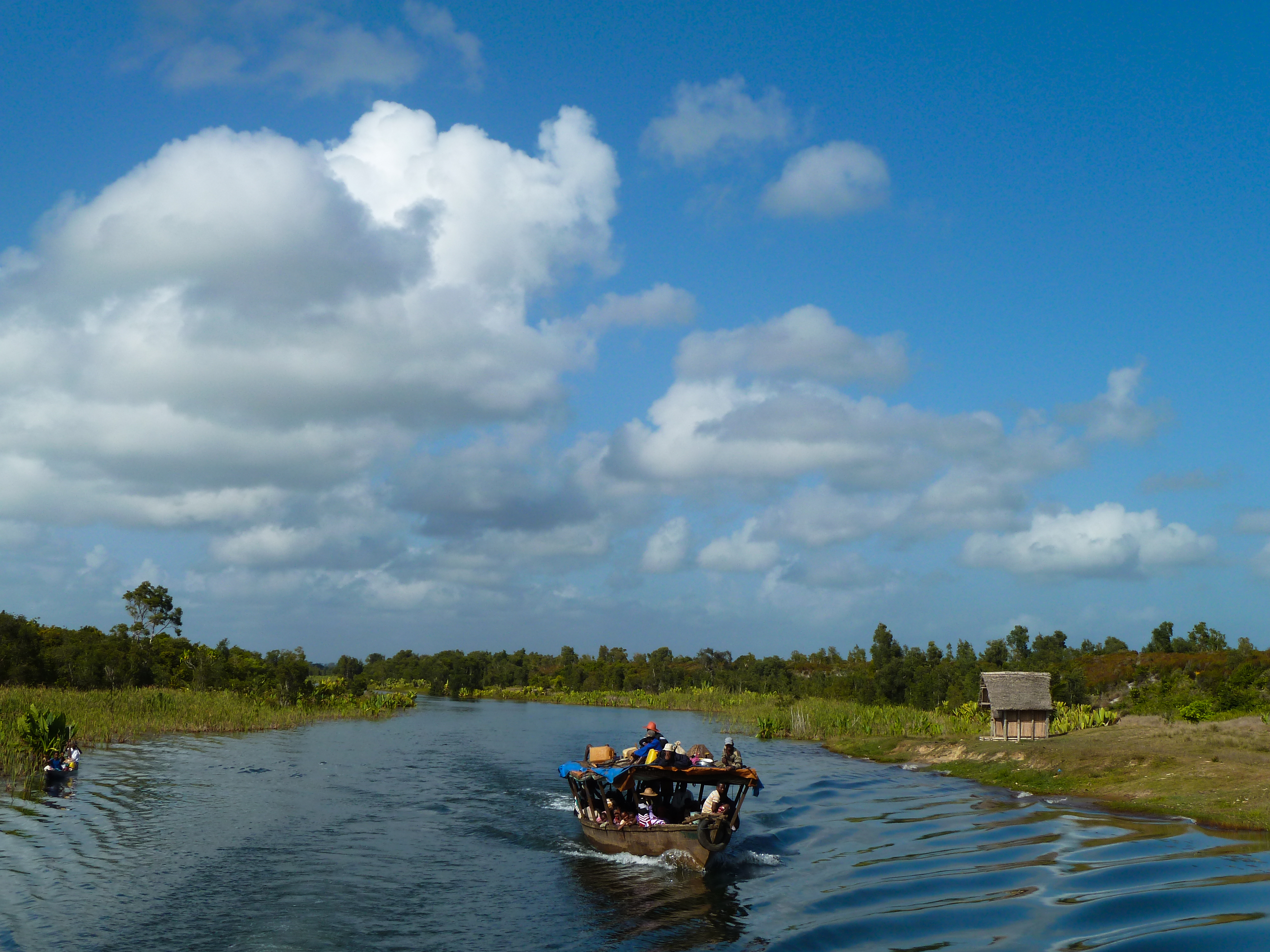 Canal des Pangalanes tussen Mananjary en Nosy Varika